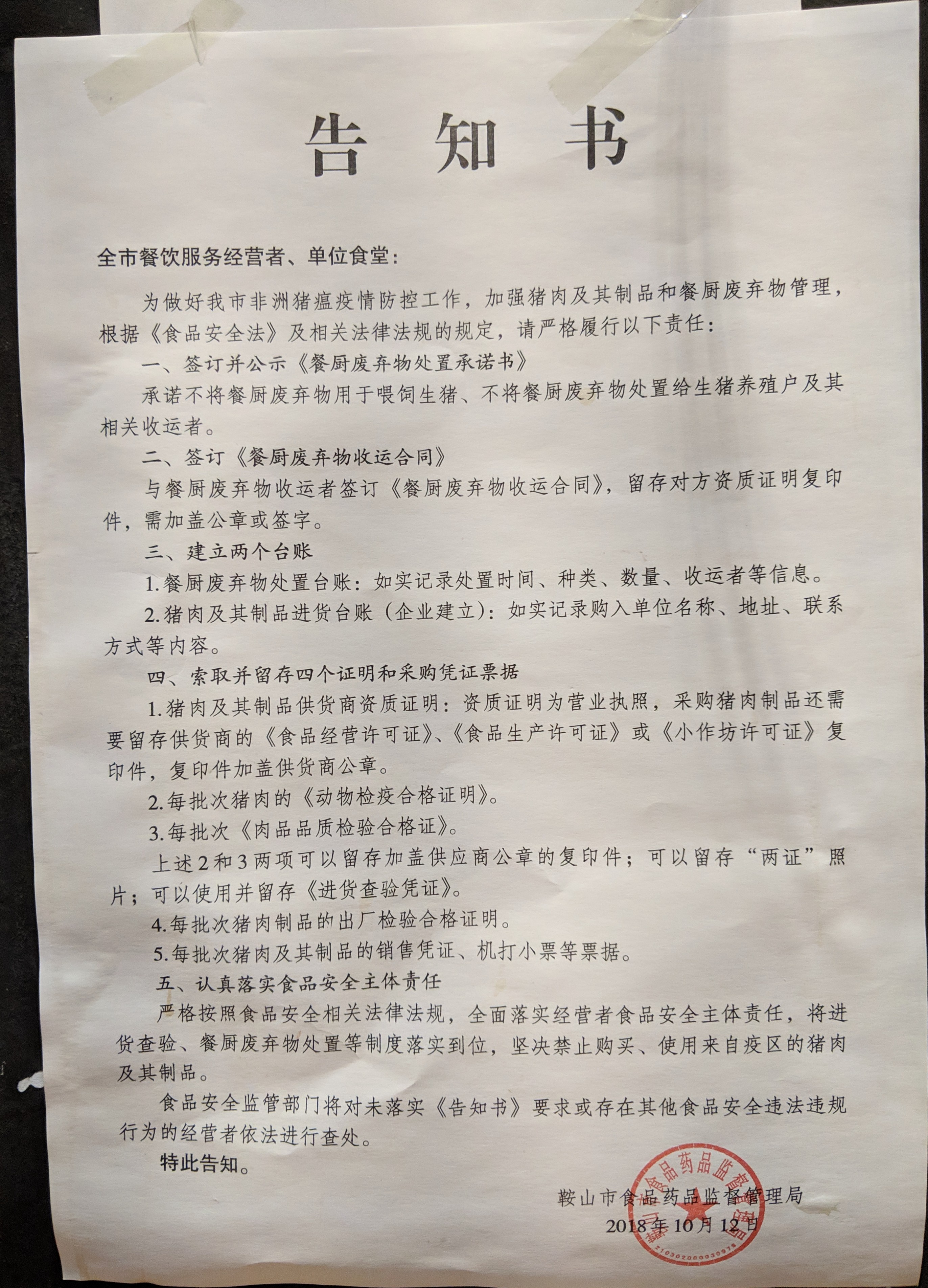 辽宁鞍山一处要求餐饮营业者强化猪肉制品管理，以控制2018年非洲猪瘟疫情的告示。